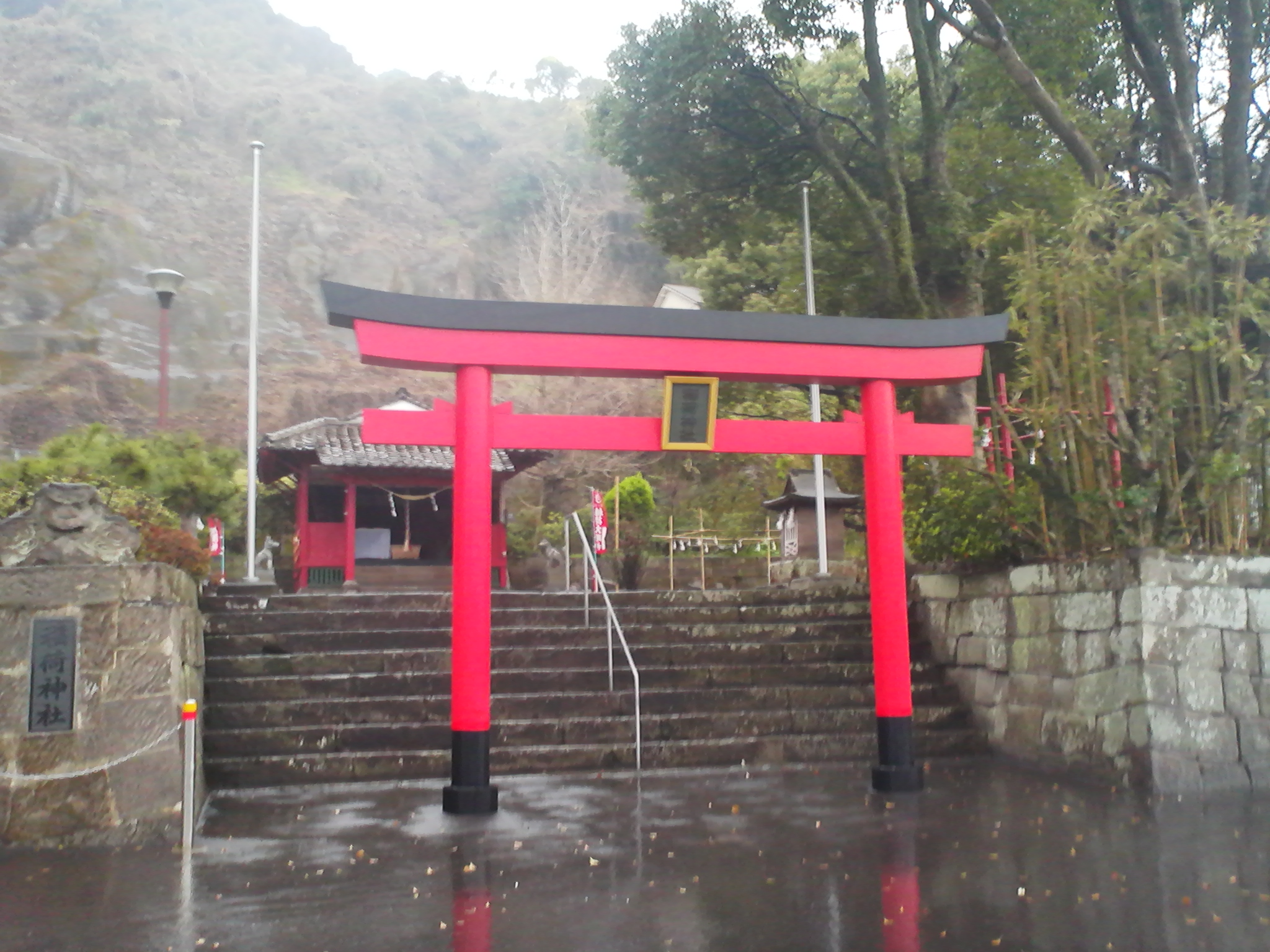 鹿児島県鹿児島市にある稲荷神社の外観。